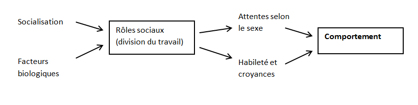 Théorie des rôles sociaux (Eagly, 1987), in Serge Guimond, Psychologie sociale: perspective multiculturelle, Éditions Mardaga, 2010, p.158